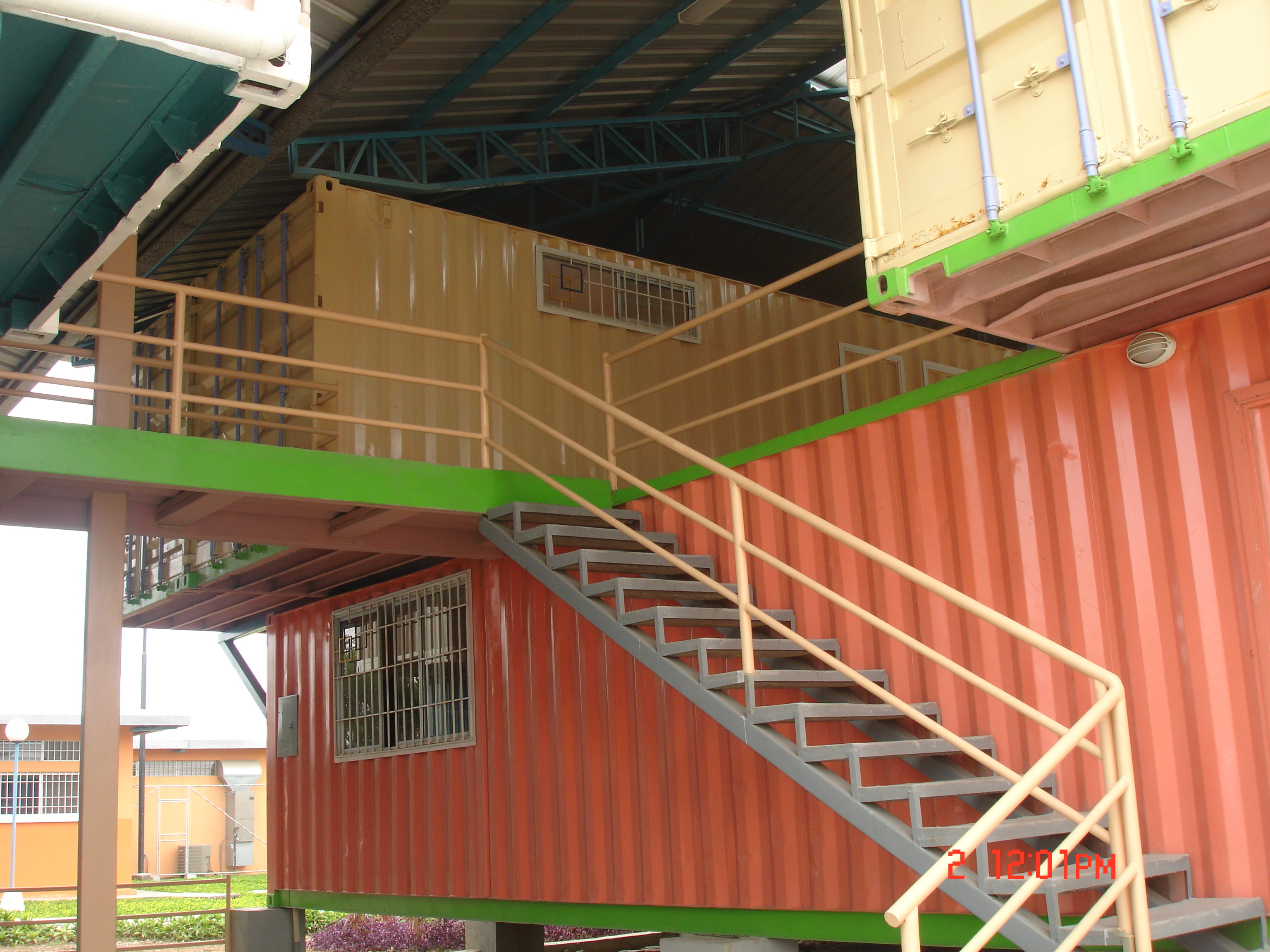 Reutilización de contenedores marítimos en un centro de capacitación. Bastión Popular. Guayaquil, Ecuador. Detalle de los accesos a los diversos niveles.